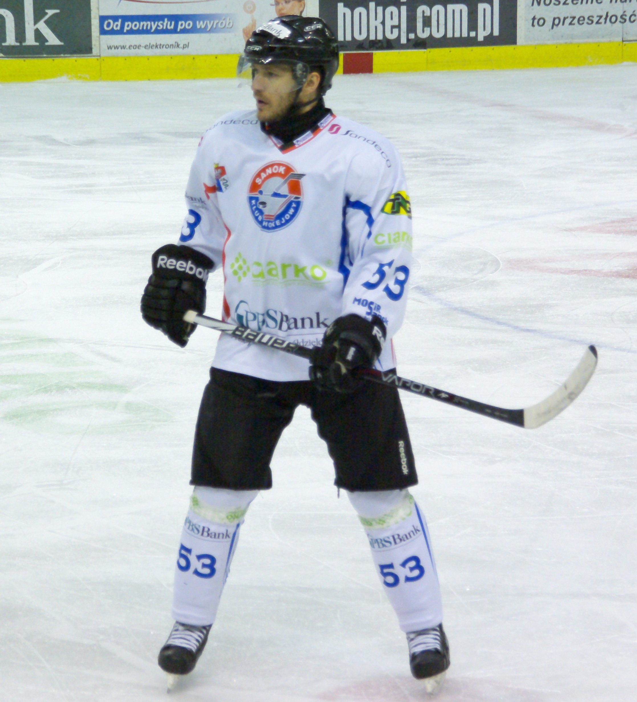 Pavel Mojžíš w barwach Ciarko PBS Bank Sanok w meczu z Zagłębiem Sosnowiec 10 lutego 2012